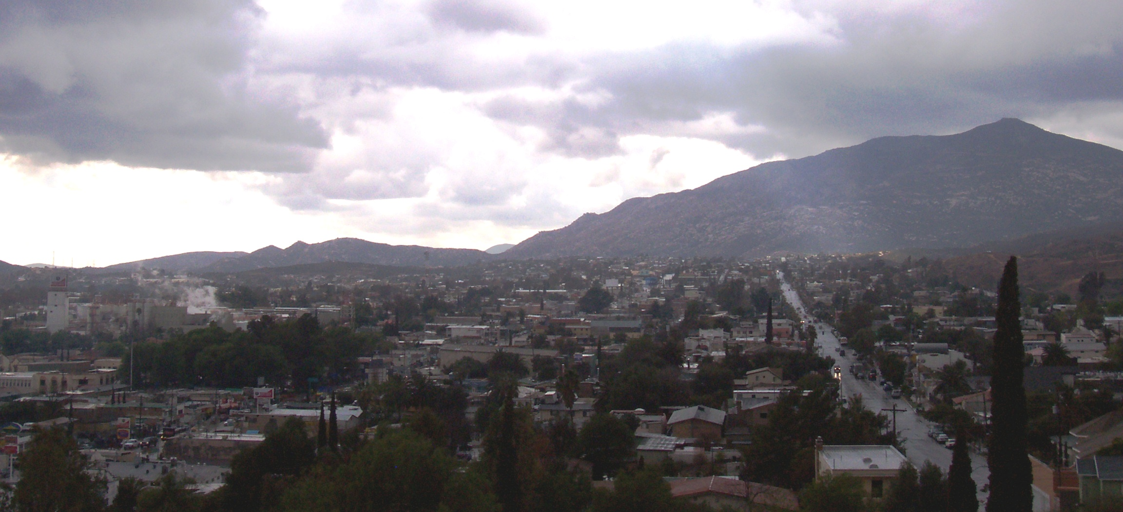 Panoramica de Tecate